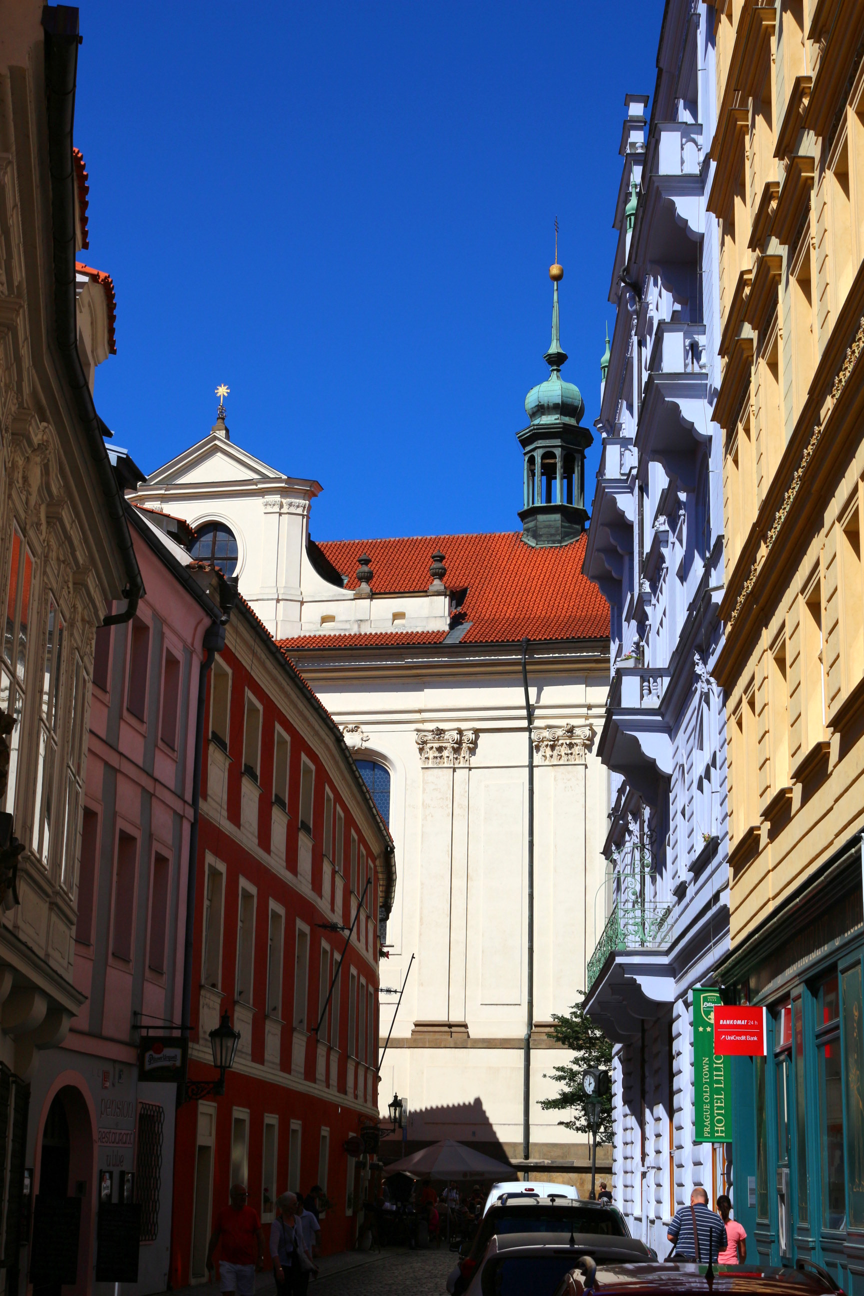 Kostel sv. Klimenta v Klementinu